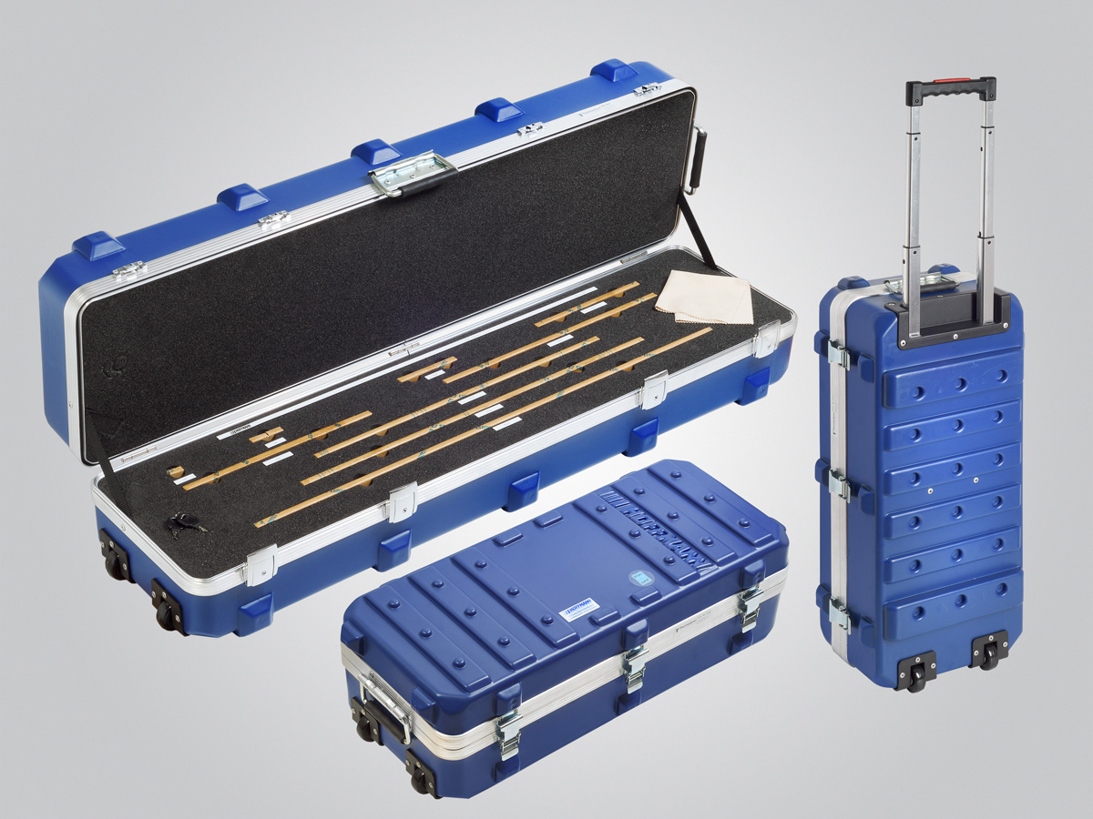 Herbert Hoffmann GmbH, Endmaßsatz in Trolley Ausführung